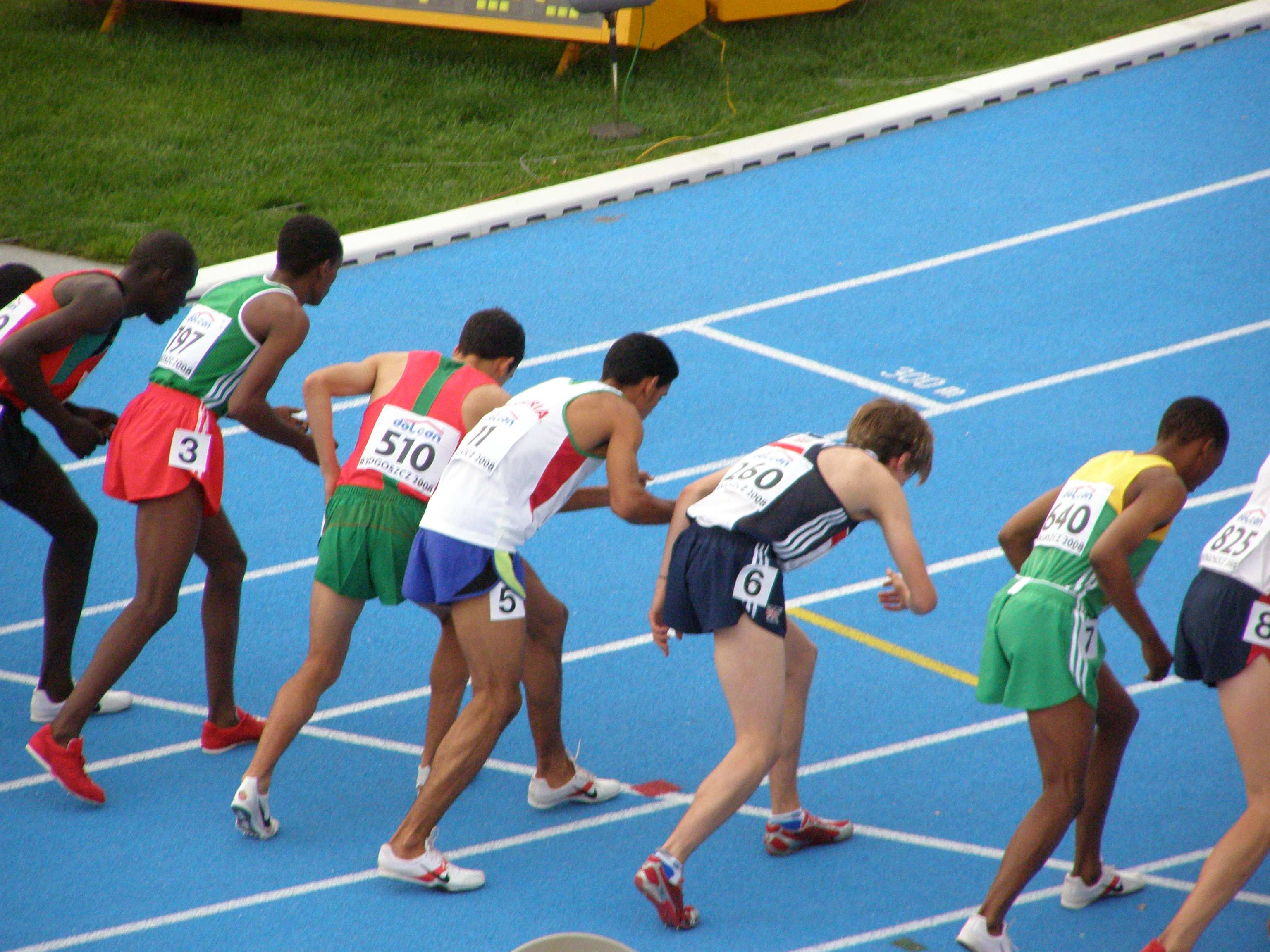 Mistrzostwa Świata Juniorów w Lekkoatletyce - Bydgoszcz 2008 - finał 1500m M